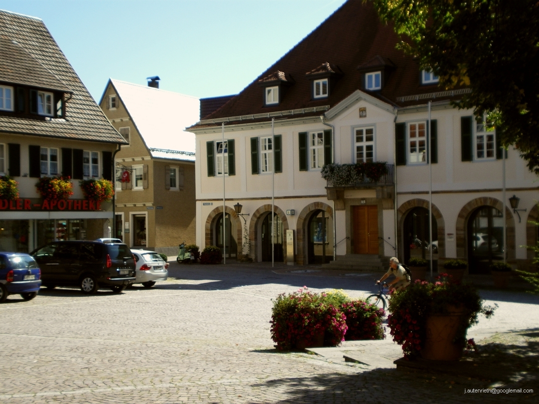 Weilheimer Rathaus nach der Re-Renovierung 2008